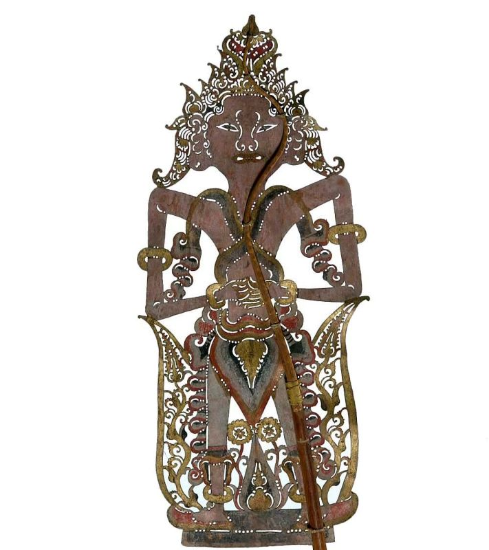 Wajangfiguur. Wajangfiguur van karbouwenhuid, de godenfiguur Sang Hyang of godenbemiddelaar Tunggal voorstellend Unknown language: wayang purwa